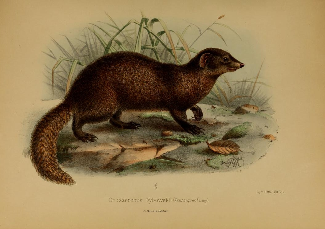 Illustration originale associée à la description de la mangouste de Dybowski (Dologale dybowskii) et publiée dans les Nouvelles archives du Muséum d'histoire naturelle, série 3, tome 6.